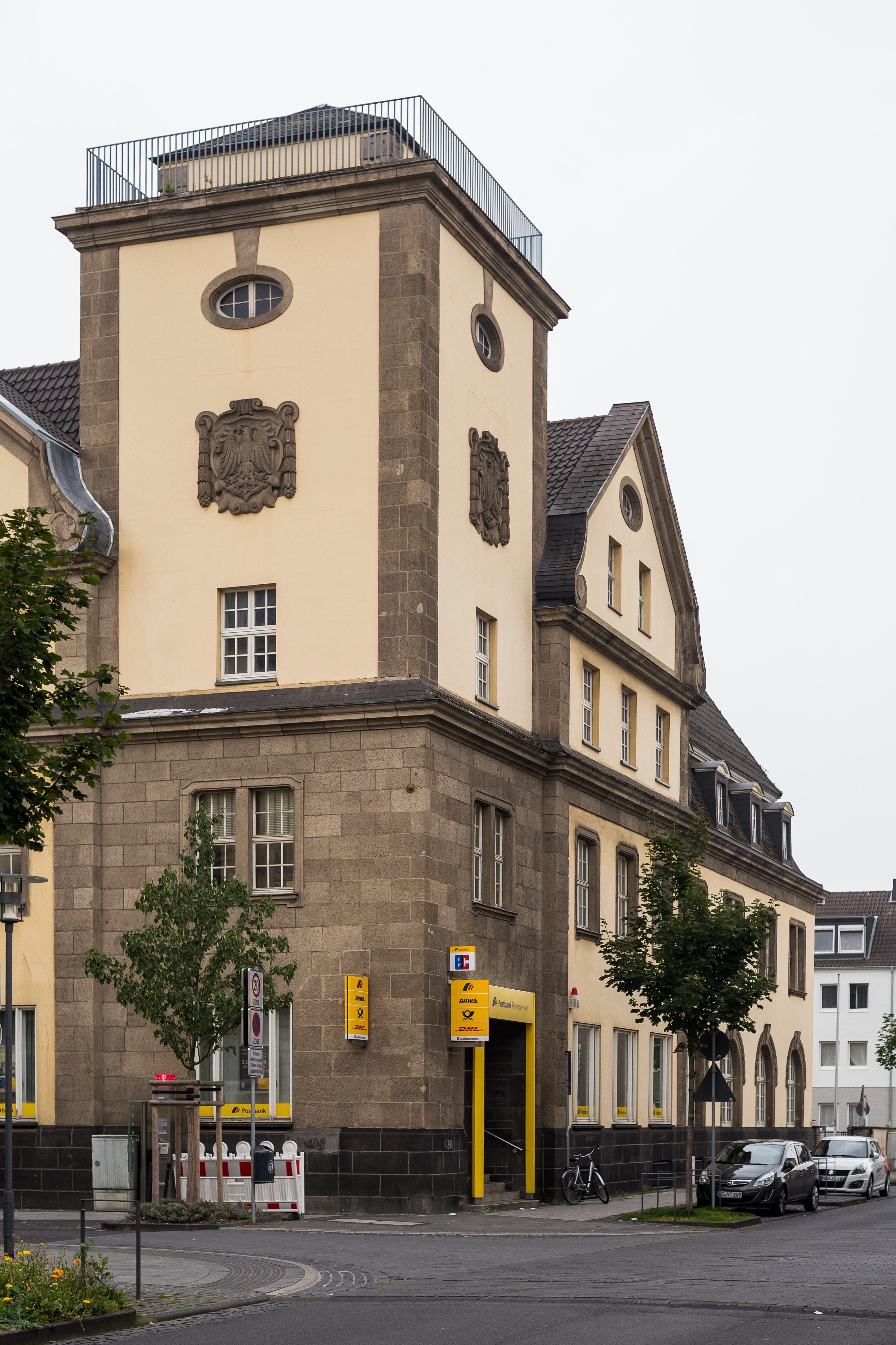 Hauptpost Eschweiler - Anno 1914. Demnächst (ca. 2016) soll hier das Jobcenter der Stadt Eschweiler einziehen, so die bisherigen und offiziellen Planungen.